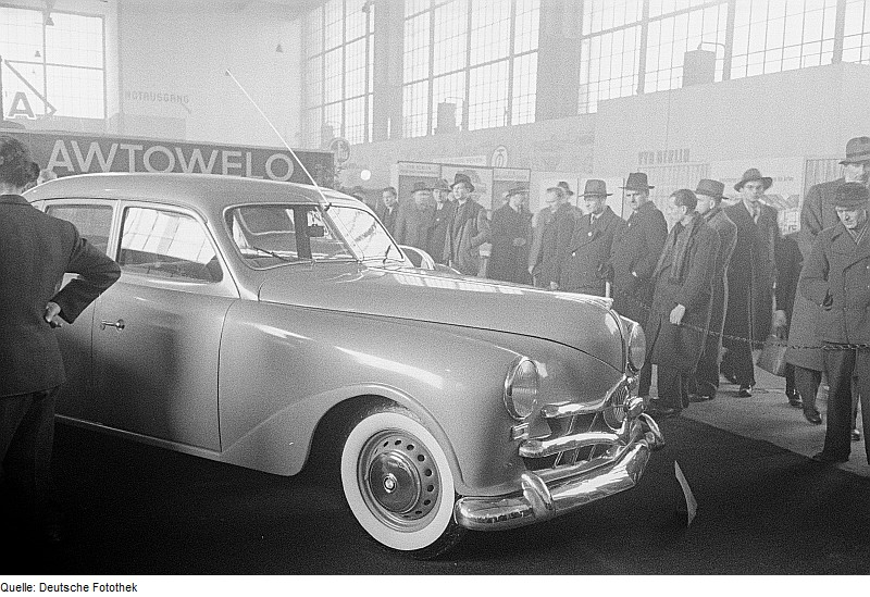 Original image description from the Deutsche Fotothek Besucher vor einem Automobil